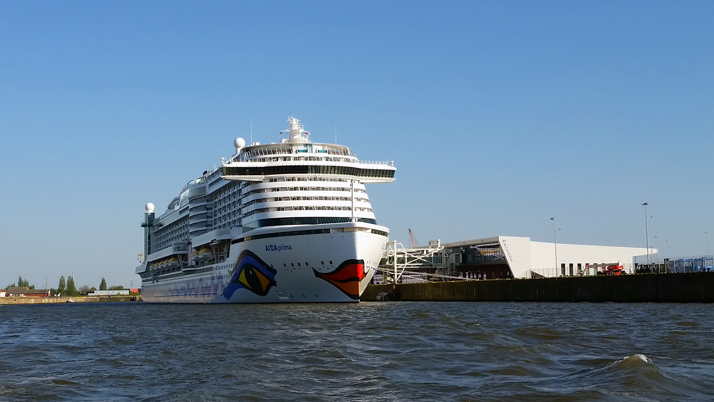 Kreuzfahrtschiff AIDAprima am 7. Mai 2016 am Hamburg Cruise Center Steinwerder